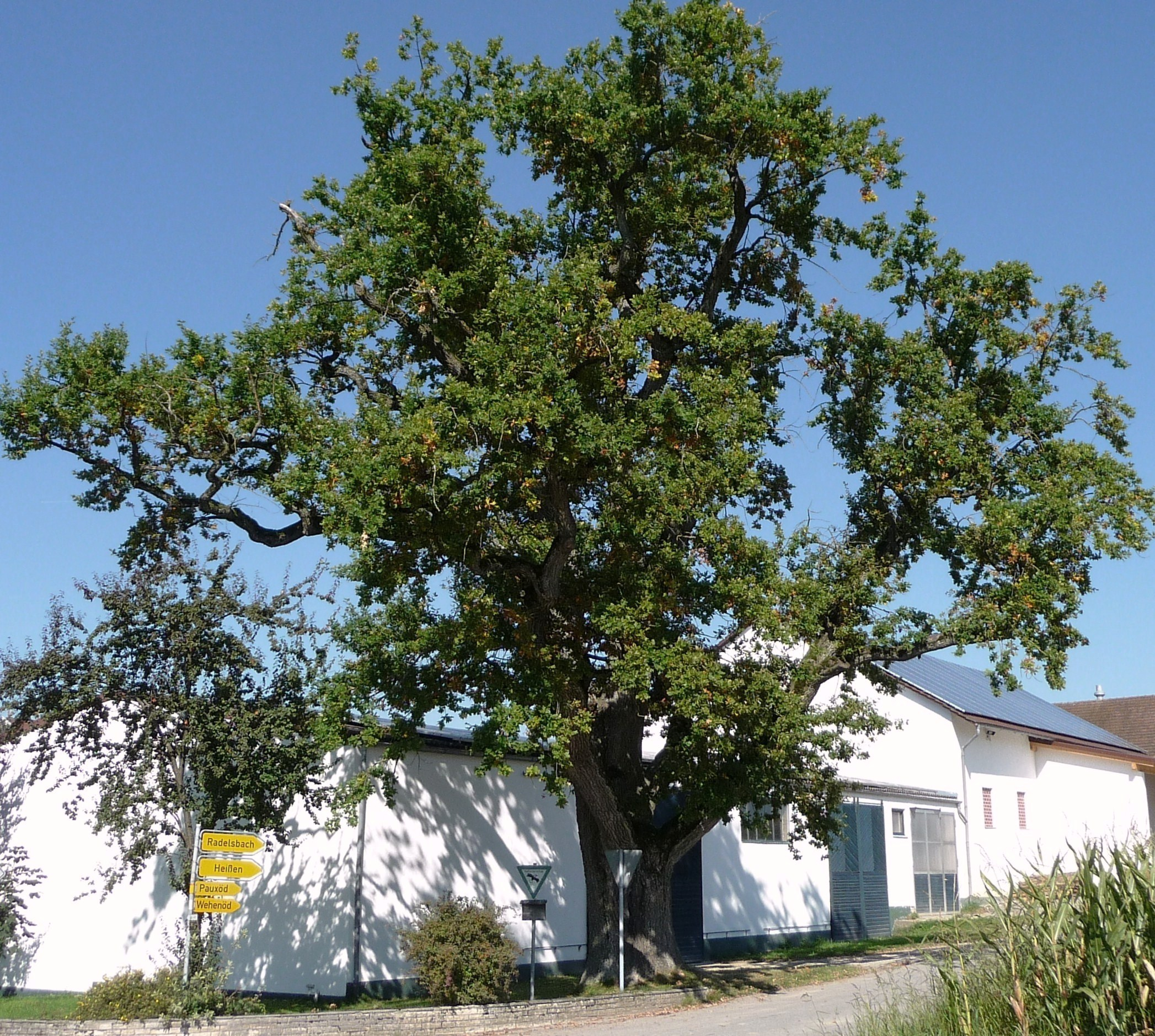 Naturdenkmal Eiche in Neukirchen. Landschaftsprägender Einzelbaum Alter über 200 Jahre